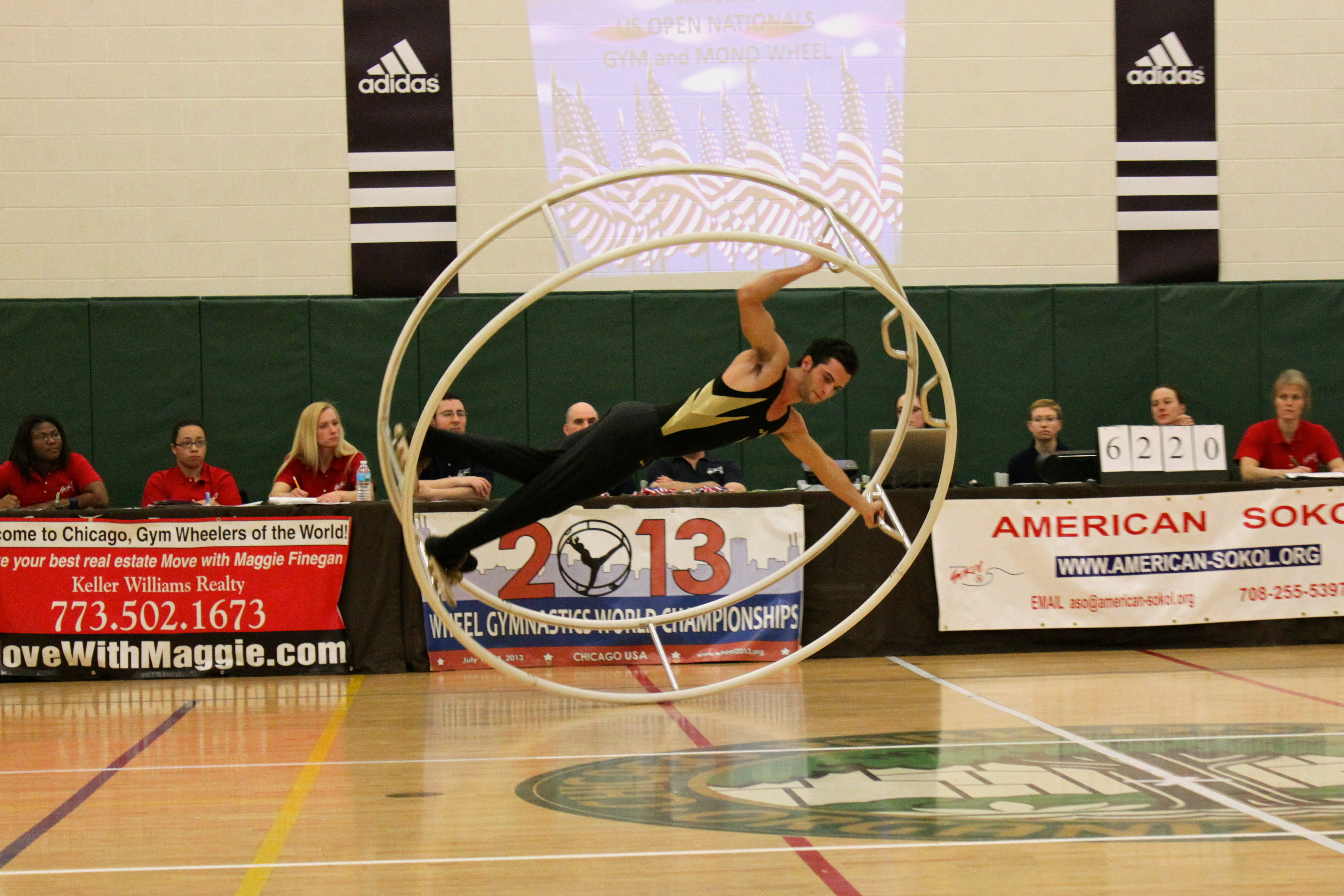 עידו לביטוב בתרגיל ספירלה מתוך אליפות ארה"ב הפתוחה בהתעמלות גלגלי ענק, אשר התקיימה במרץ 2012 בשיקאגו. בתחרות זו זכה עידו במקום השני בקטגוריית הקרב-רב.